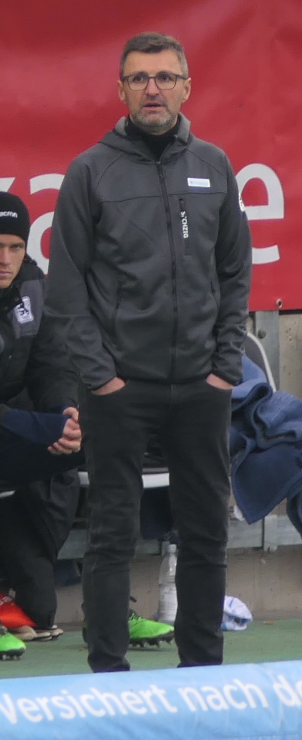 Der Fussballtrainer Michael Köllner an der Seitenlinie vom TSV 1860 München beim Heimspiel gegen Eintracht Braunschweig am 26.01.2020.